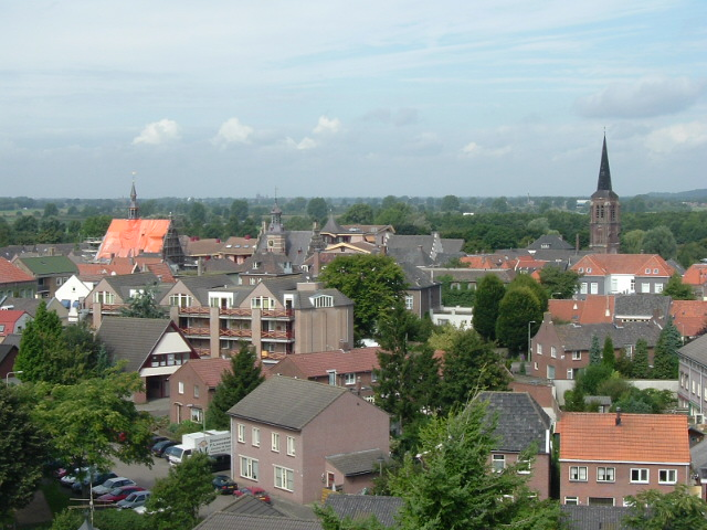 Blick über die Ortschaft und in den Norden der Provinz Limburg